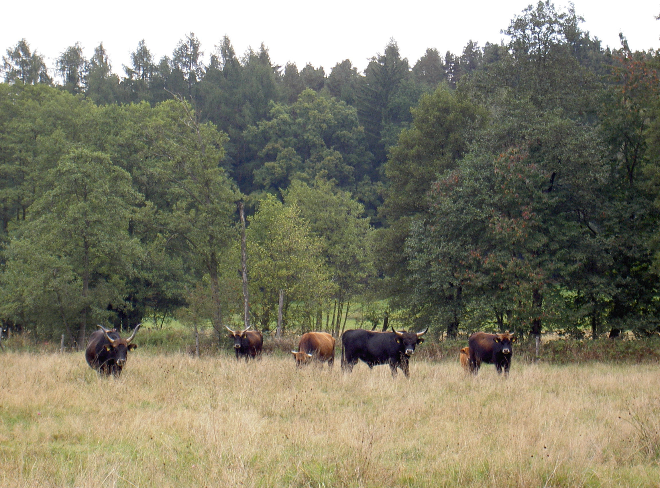 Heckrinder in der Markbachaue